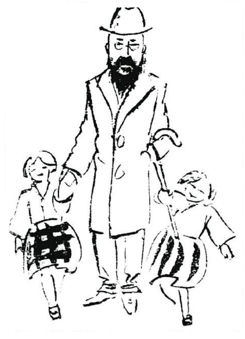 "가두에서 본 인물 (1), 잡지 혜성 지 1931년 12월호에 실린 윤치호 캐리커처